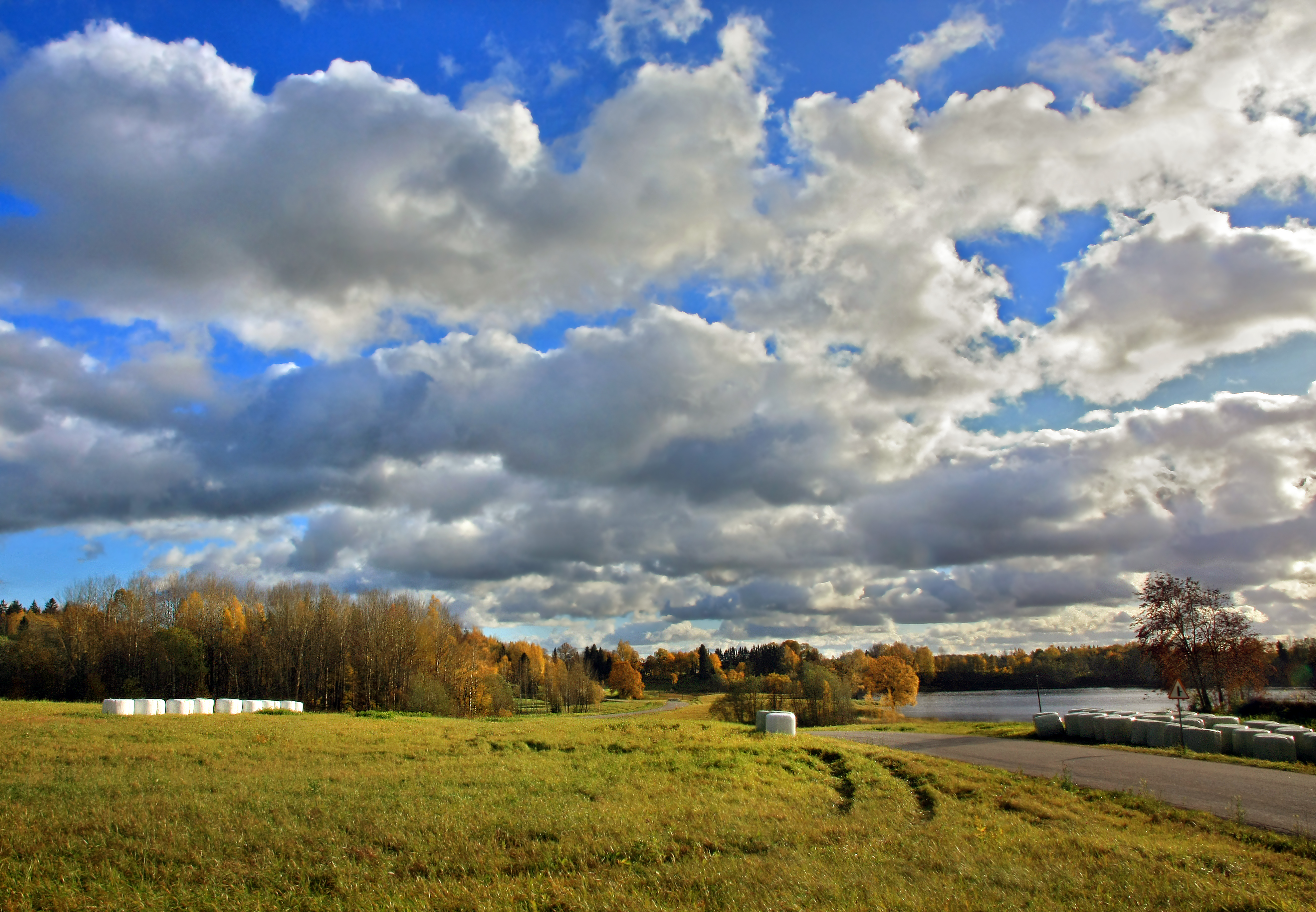 Külajärv Plaani küla maastikul